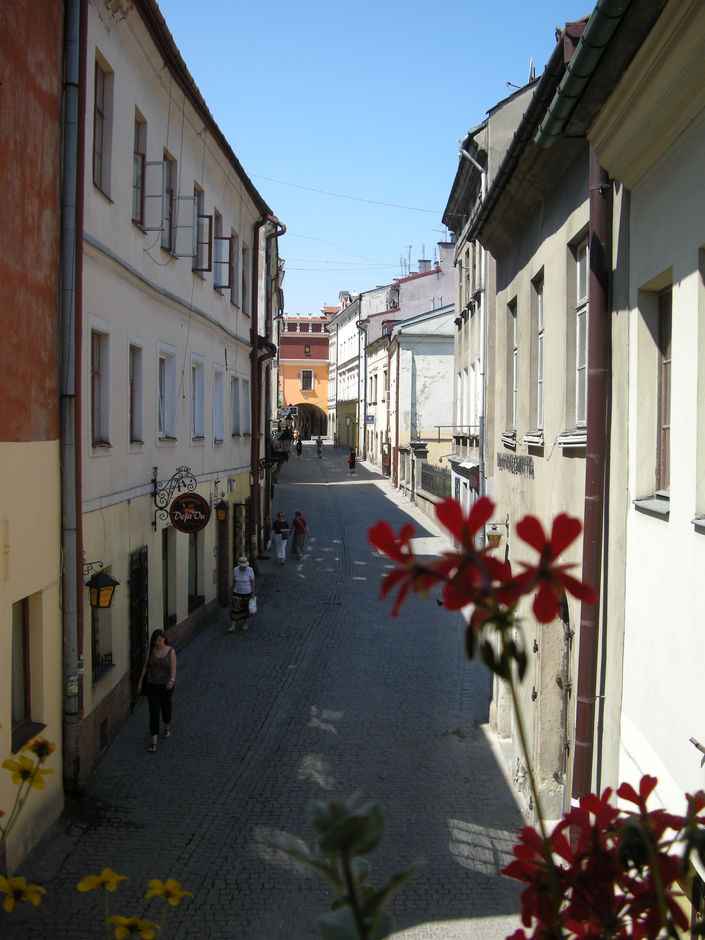 Ulica Żydowska